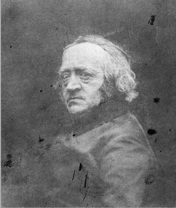 Nicolaas Henneman (1813-1898). Portrait of the painter William Henry Hunt (1790-1864)